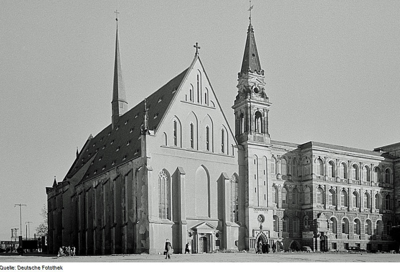 Original image description from the Deutsche Fotothek Blick auf die Universitätskirche St. Pauli am Karl-Marx-Platz (heute: Augustusplatz) (Ergänzung der Originalbildunterschrift: Der Karl-Marx-Platz befindet sich auf der anderen Seite der Kirche, diesseits war ehemals der Pauliner-(Innen-)Hof der Universität.)